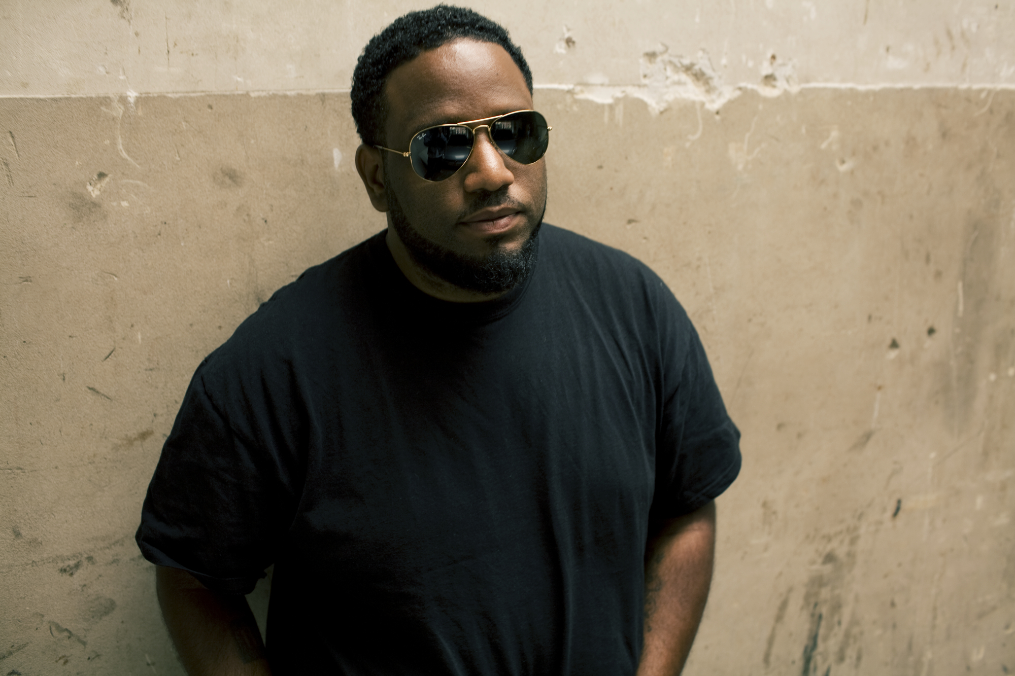 Nederlands Olivier Mitshel Locadia (Poortvliet, 30 mei 1982), bekend als Willie Wartaal